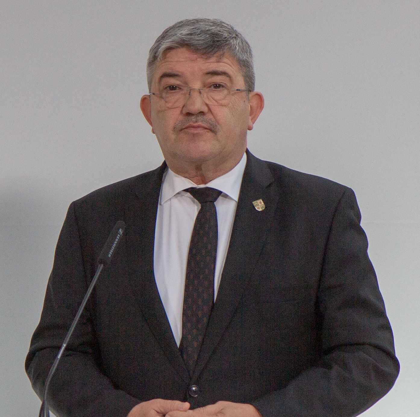 Lorenz Caffier auf der Pressekonferenz zum Abschluss der 209. Innenministerkonferenz vom 28.-30. November in Magdeburg